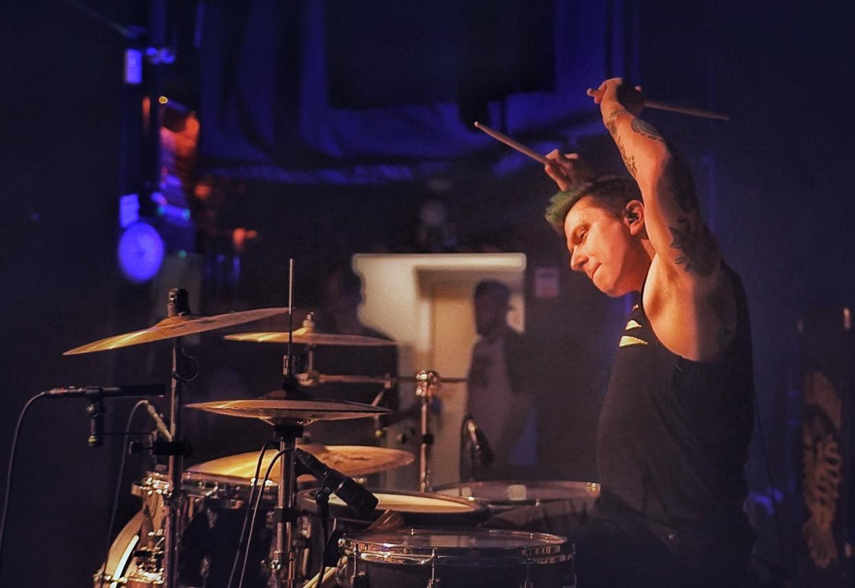 Pavel - foto z koncertu